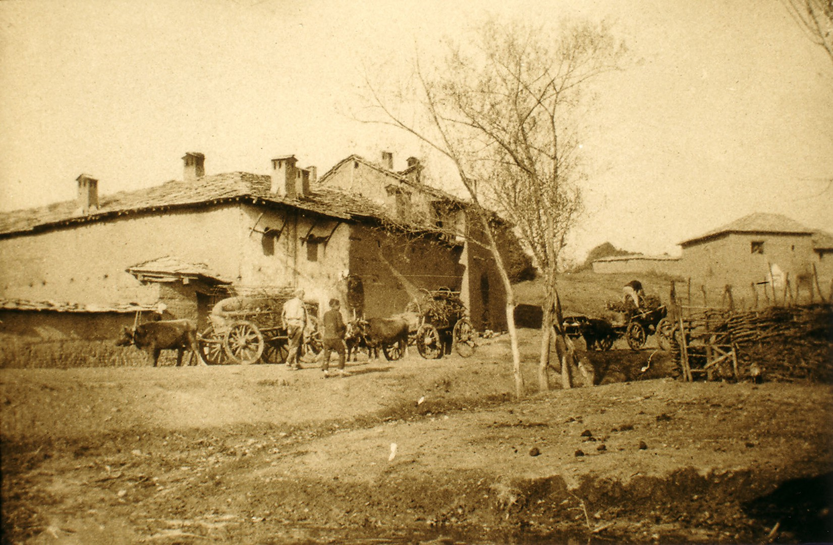 283 Kosova. Suhareka (Theranda) between Prizren and Ferizaj, 1903